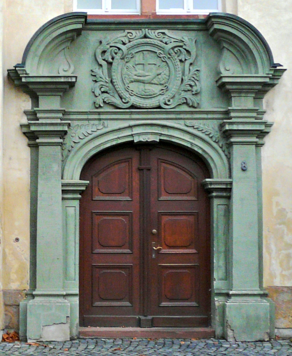 Eingangsportal der Franziskanerkirche (Langhaus), die heute als Musikschule genutzt wird, am Schillerplatz in Wetzlar (Hessen)